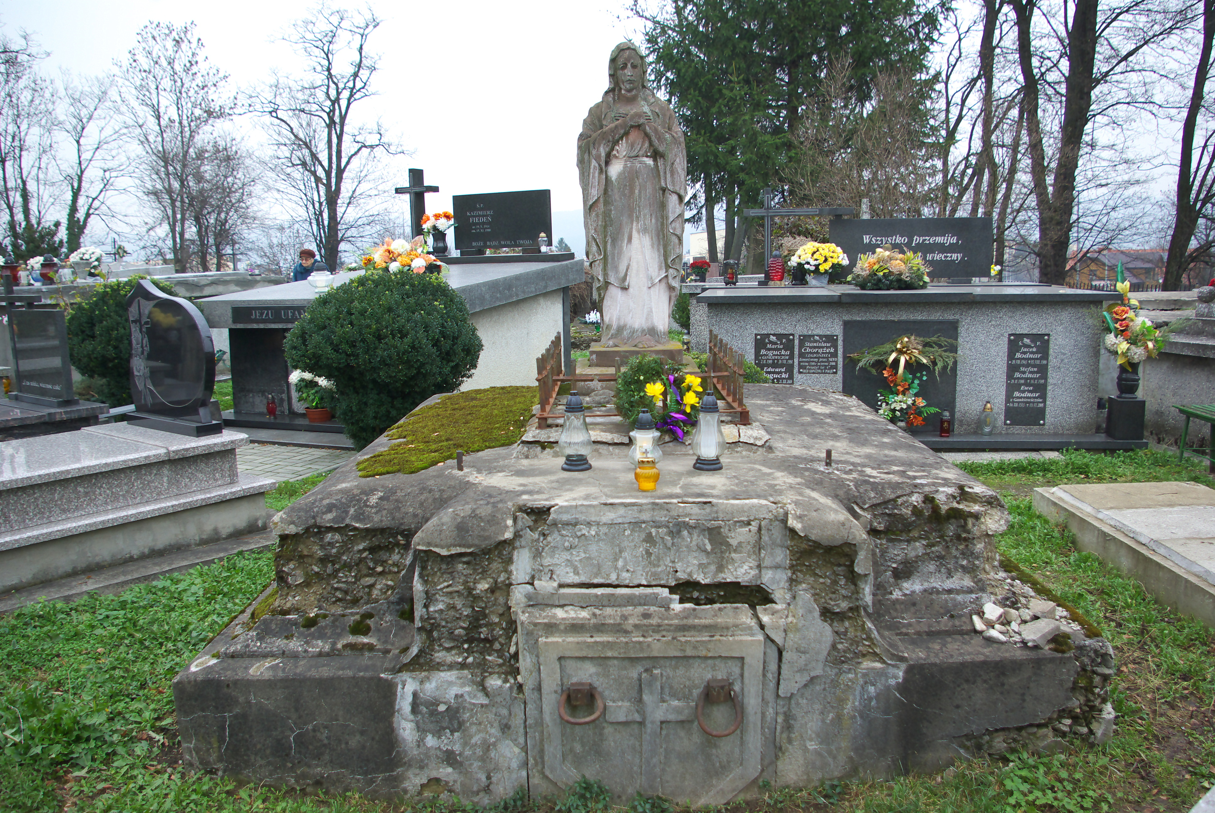 Grobowiec rodziny Bornstedt i Bubella w części „Matejki Stary” Cmentarza Centralnego w Sanoku